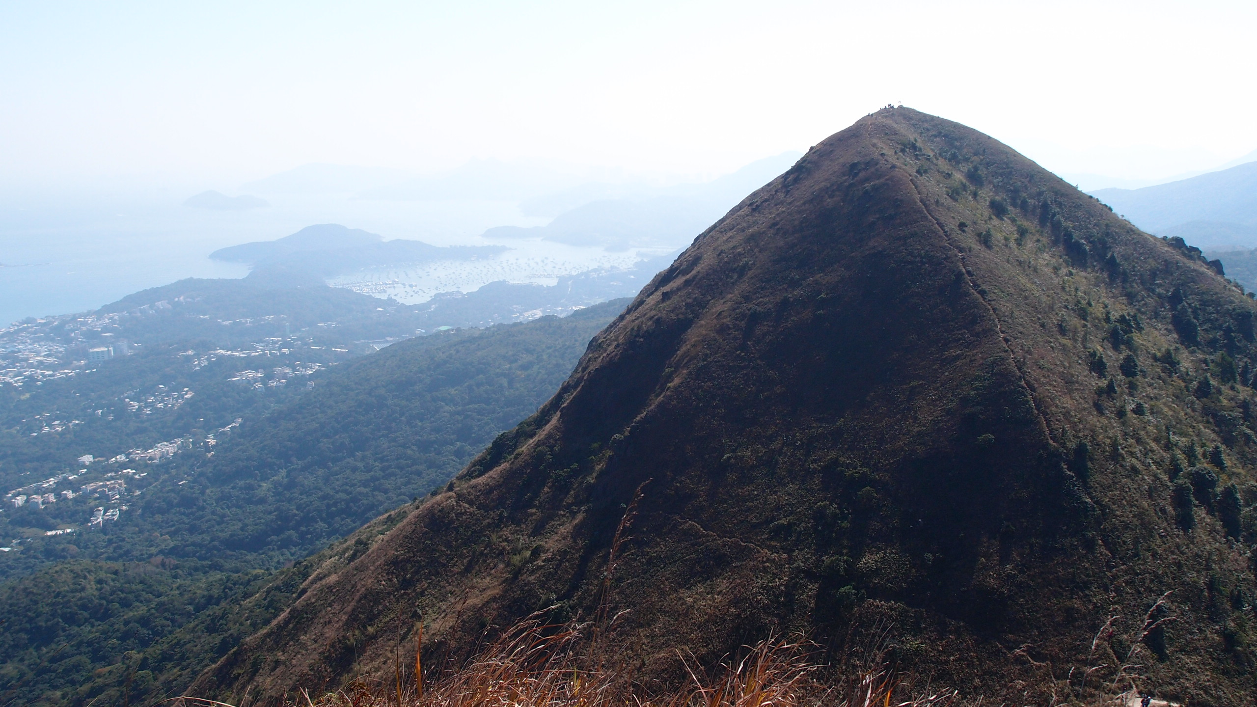 中文（香港）: 大金鐘的東北面